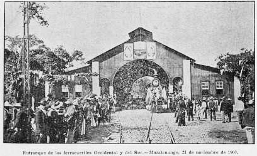 Entronque de los ferrocarriles de Occidente y del Pacífico en Mazatenango. Revista guatemalteca "La Locomotora", 1906